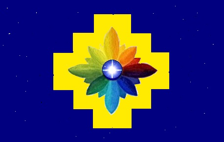 é uma bandeira azul simbolizando o céu estrelado, uma chacana (cruz andina) dourada, sob uma flor de 16 pétalas, com o centro uma estrela